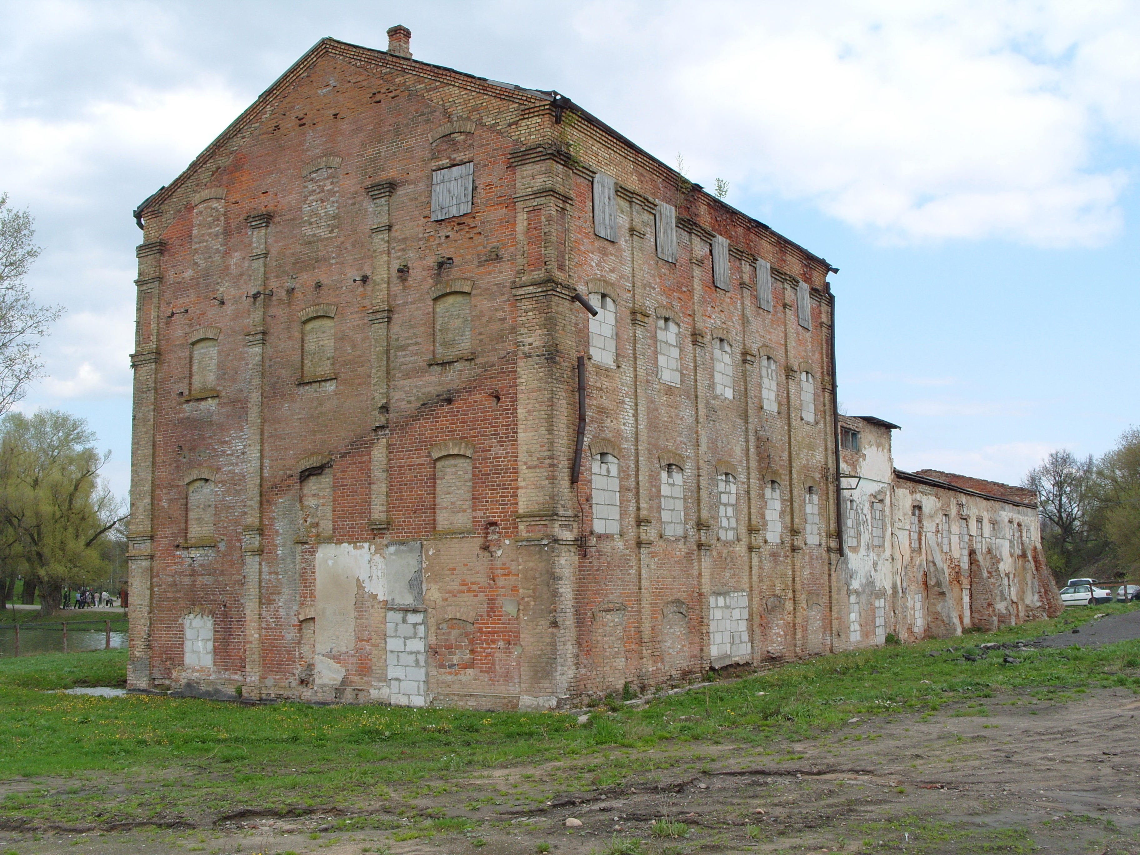 Беларуская (тарашкевіца): Комплекс бровара ў Лошыцы (Менск) This is a photo of Belarusian heritage monument. Reference number: 712Г000266 ( WLM)